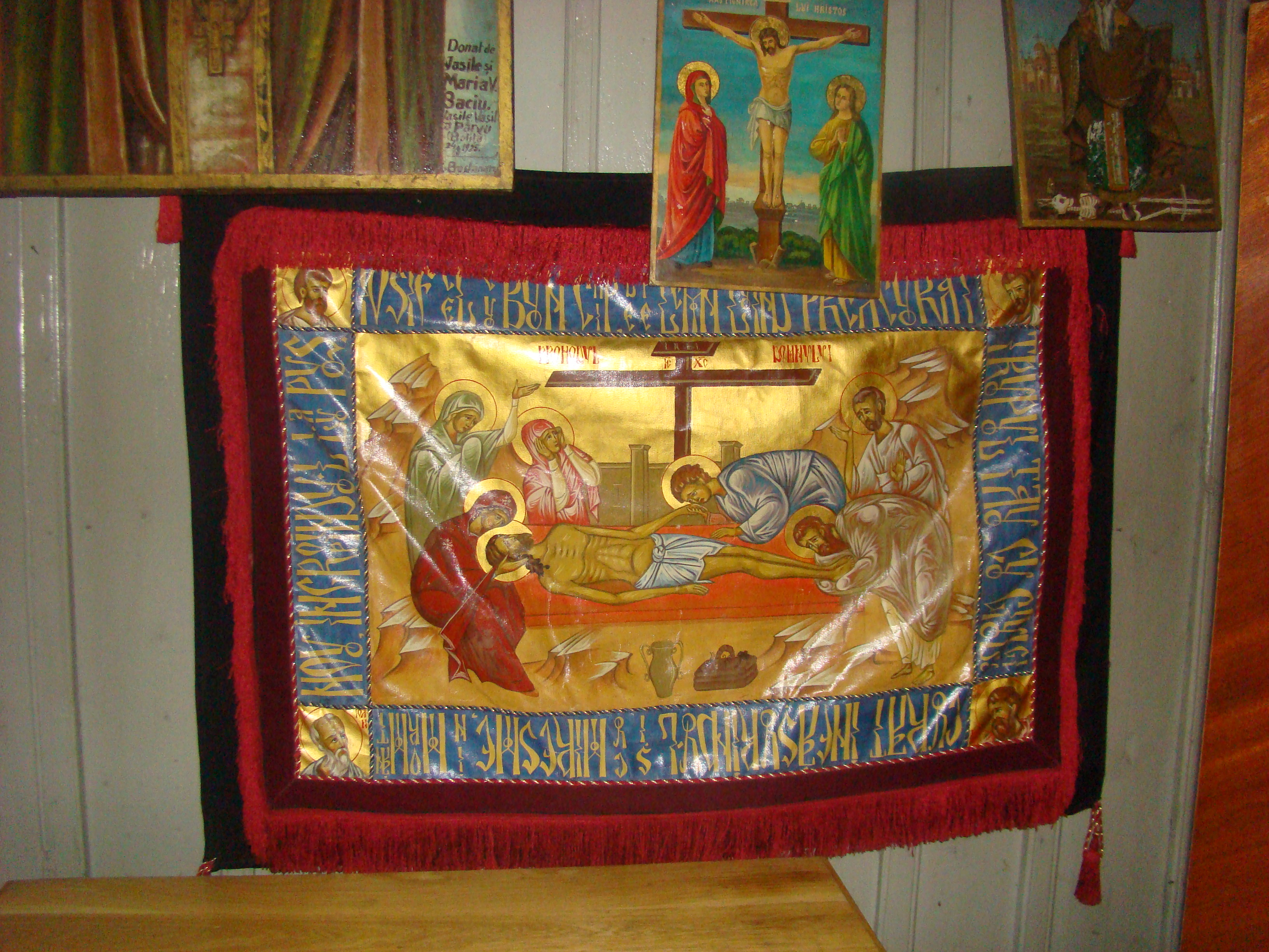 Mănăstirea Lepșa, Vrancea